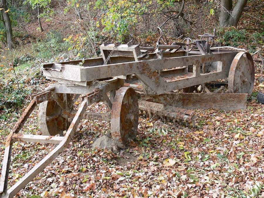 gezogener Grader, aufgenommen in Europa.